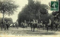 Chasse